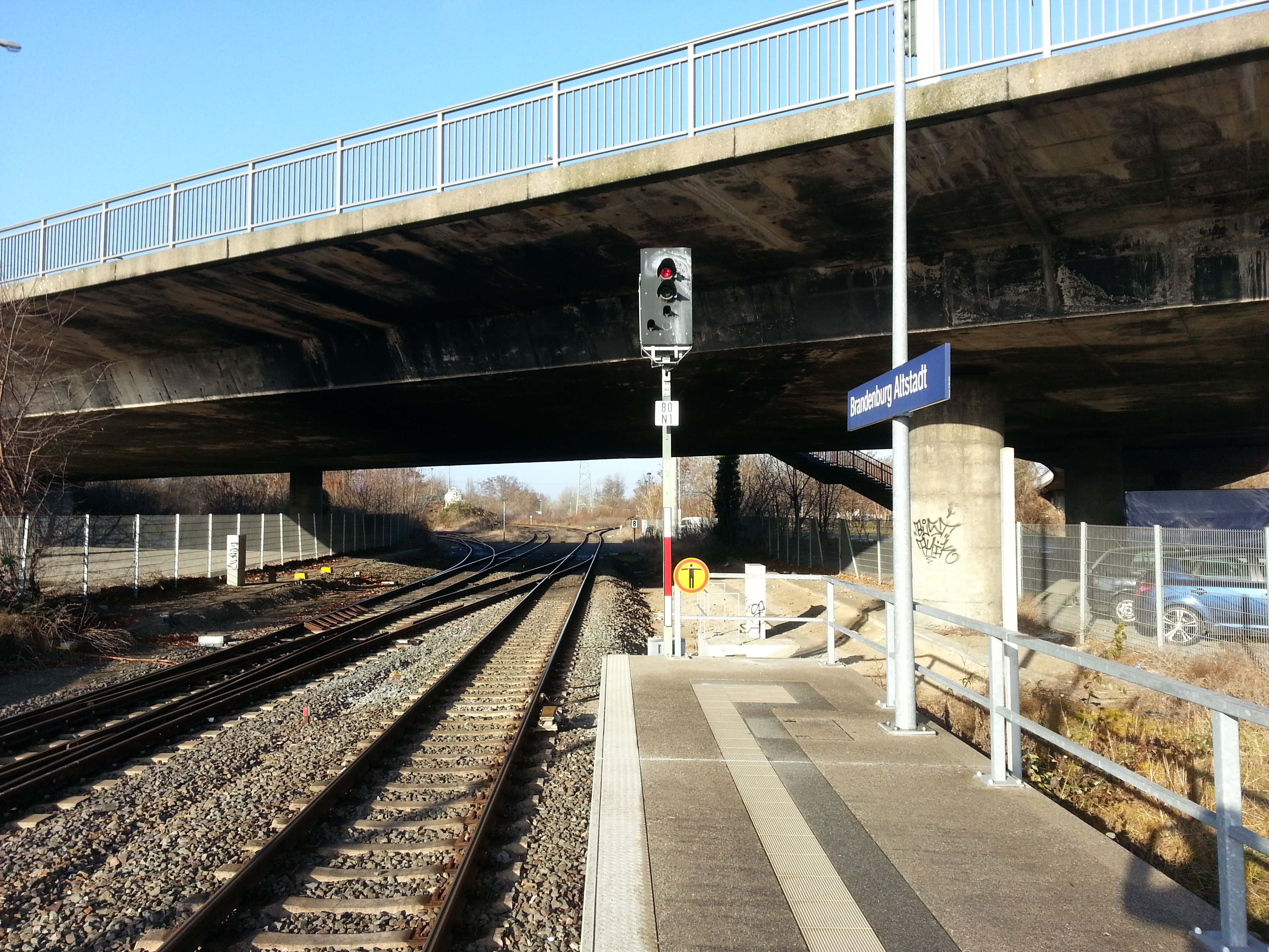 alststädtischer bahnhof brandenburg, gleise norden